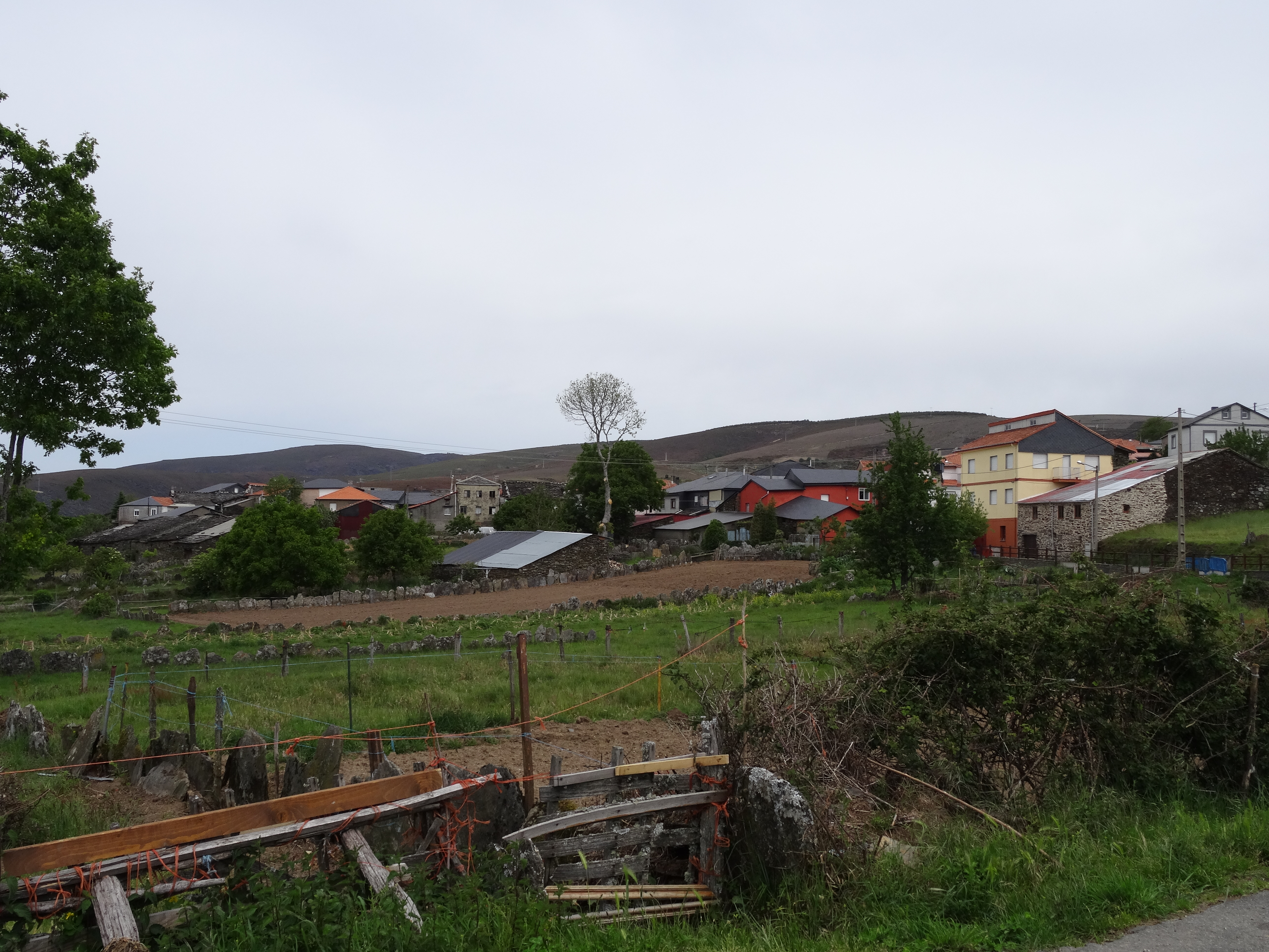 Ver título.